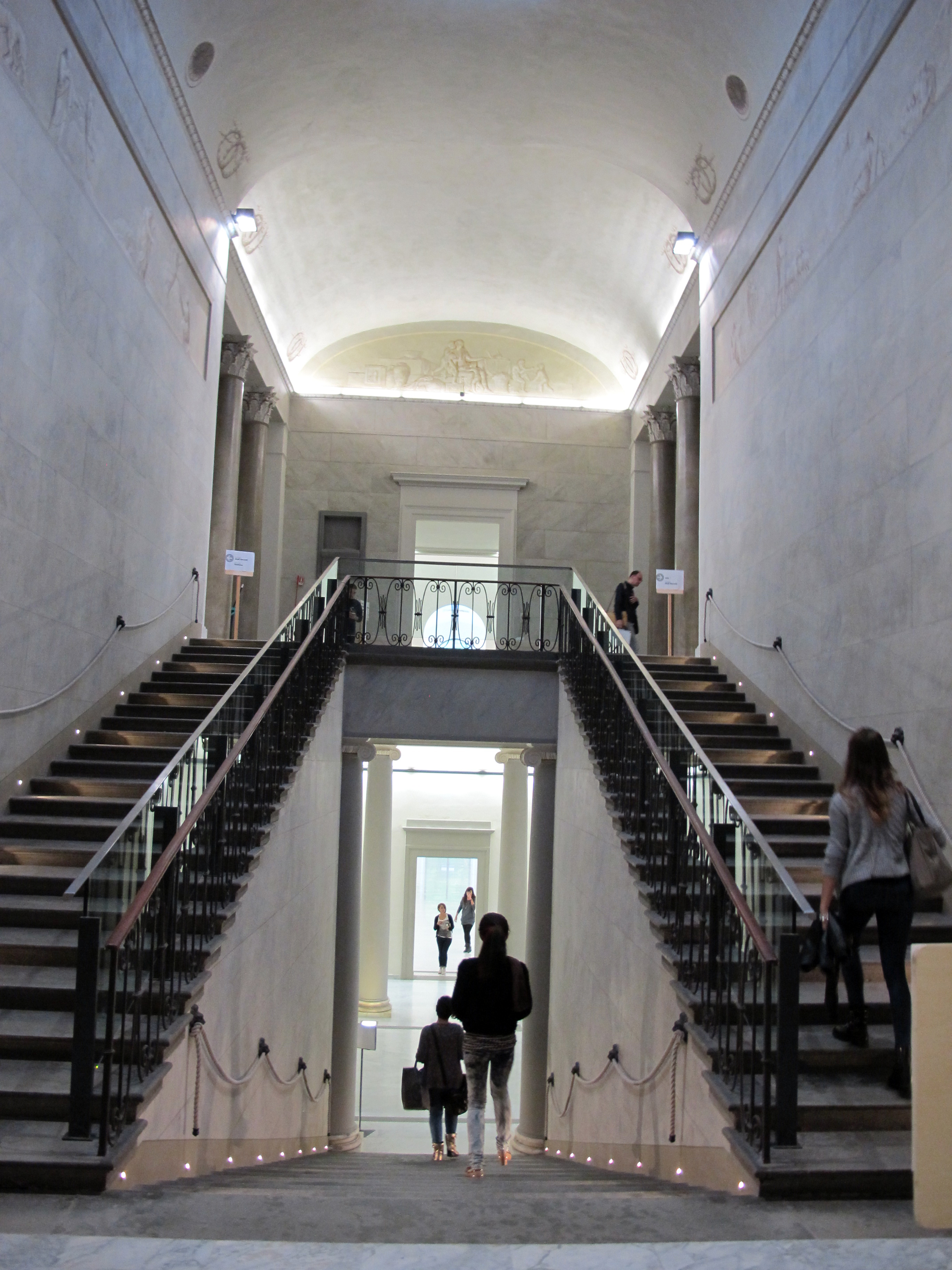 Firenze